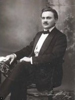 Emil Štolc (1888 - 1940), Český dirigent a hudební skladatel.